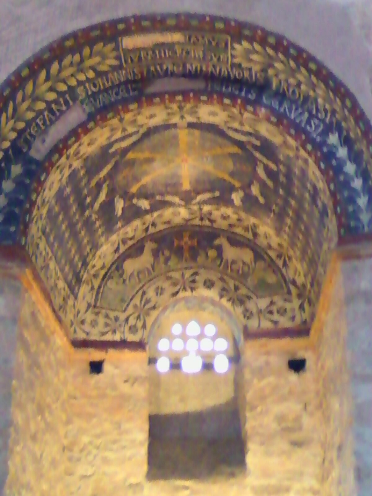 mosaico paleocristiano del battistero di Albenga (Italia)